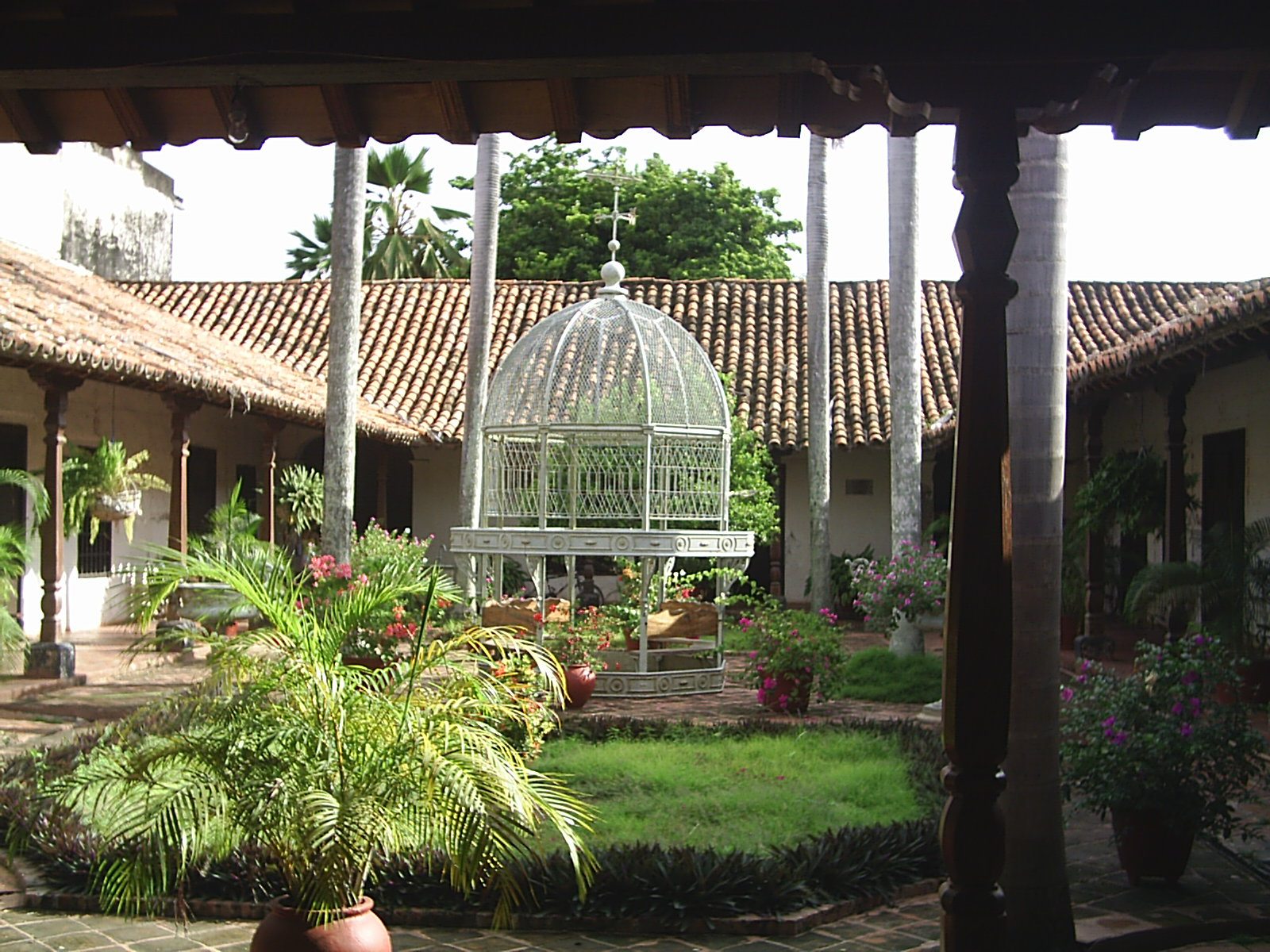 Interior de una casa momposina